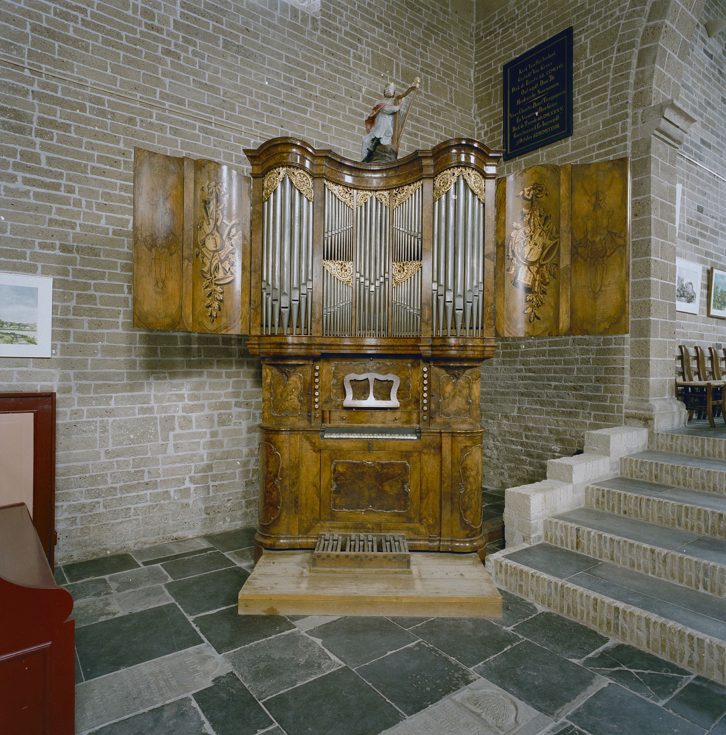 Nederlands Hervormde Kerk: Interieur, aanzicht huisorgel, orgelnummer 1146 (opmerking: Gefotografeerd voor Het Historische Orgel in Nederland 1726-1769, bladzijde 311)